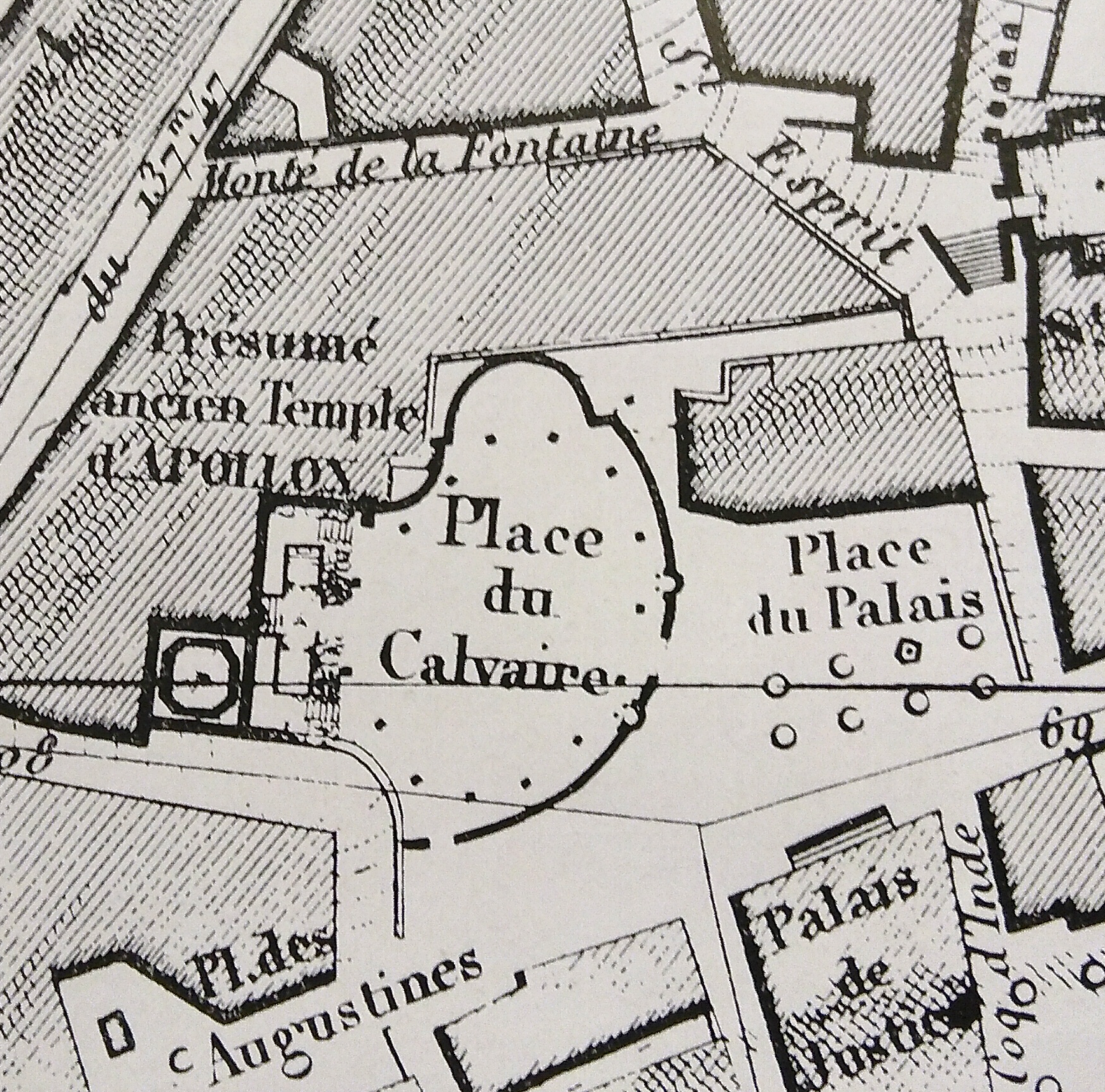 Plan de situation de la Place du Calvaire enclose de grilles devant la Place du Palais avant la construction de la nouvelle église des Accoules en 1824